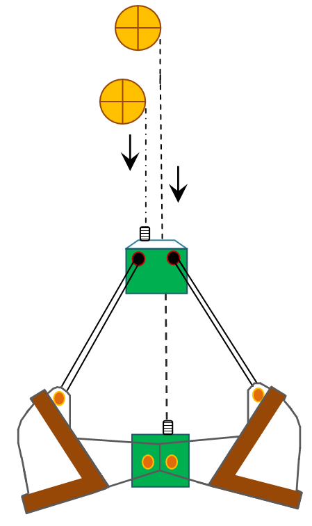 2х-канатный грейфер - операции 1 и 2